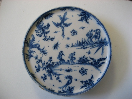 Colección de Loza de la Real Fábrica del Conde de Aranda. Museo de Cerámica de l'Alcora. Salvilla, s. XVIII